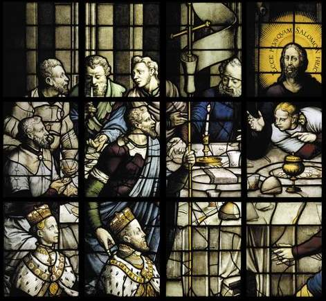 La Última Cena en la Vidriera del Rey de Gouda (Países Bajos). En la parte inferior, Felipe II de España y María Tudor, reina de Inglaterra.